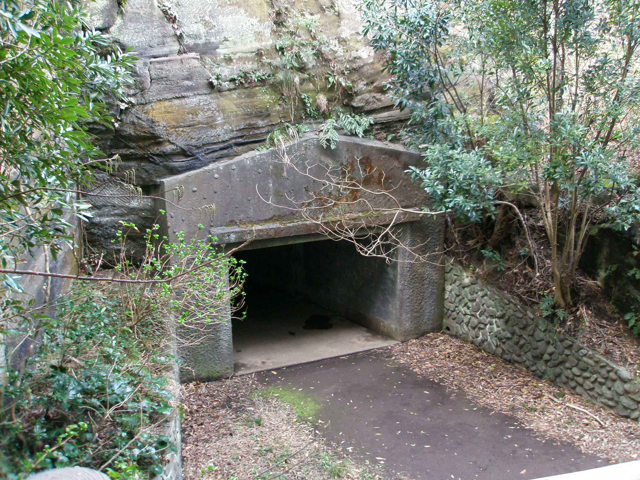 南房総市大房岬にある旧軍の探照灯格納庫跡